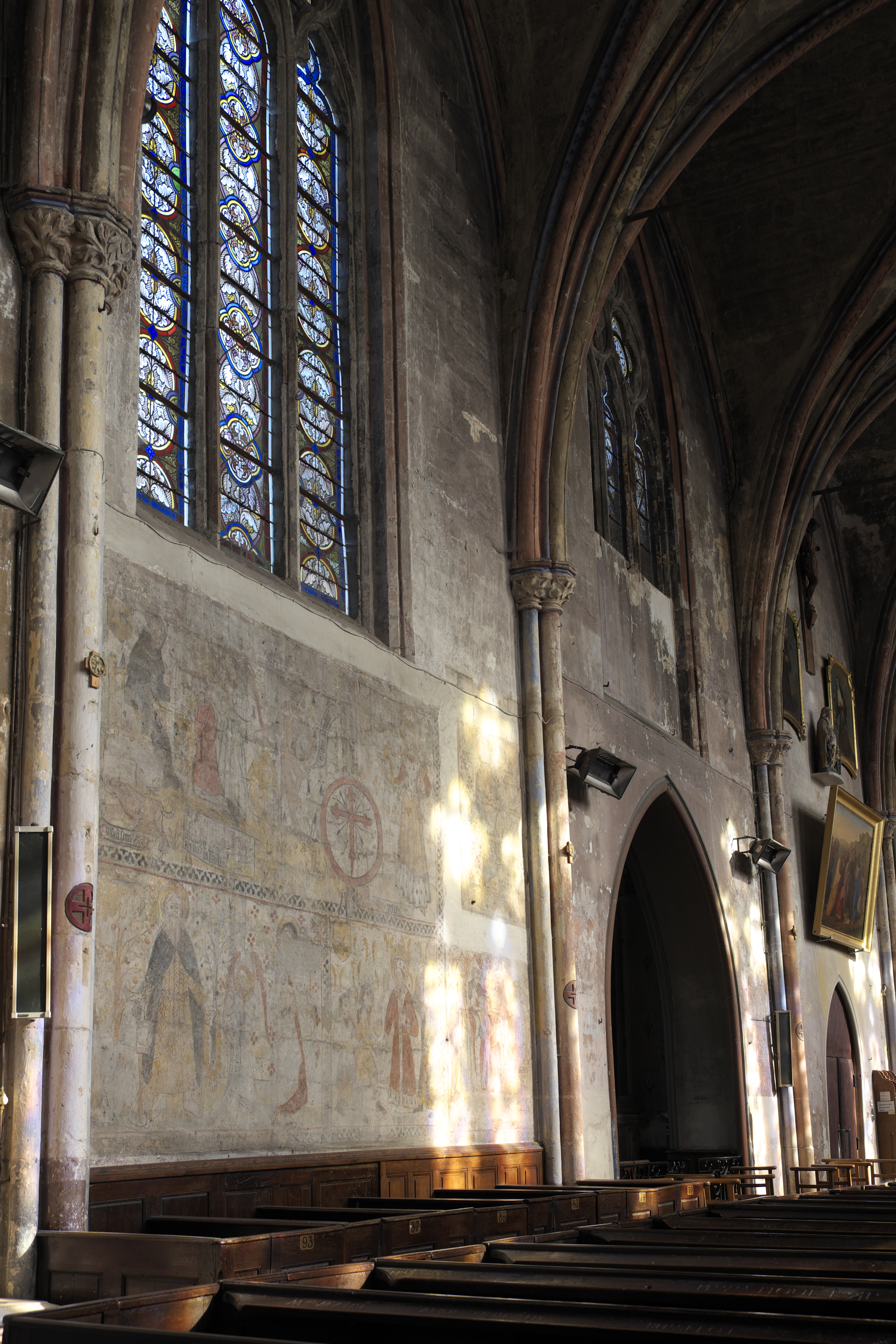 Katholische Saint-Antoine, ehemalige Klosterkirche der Augustinereremiten, in Bar-le-Duc im Département Meuse (Lothringen/Frankreich), Innenraum